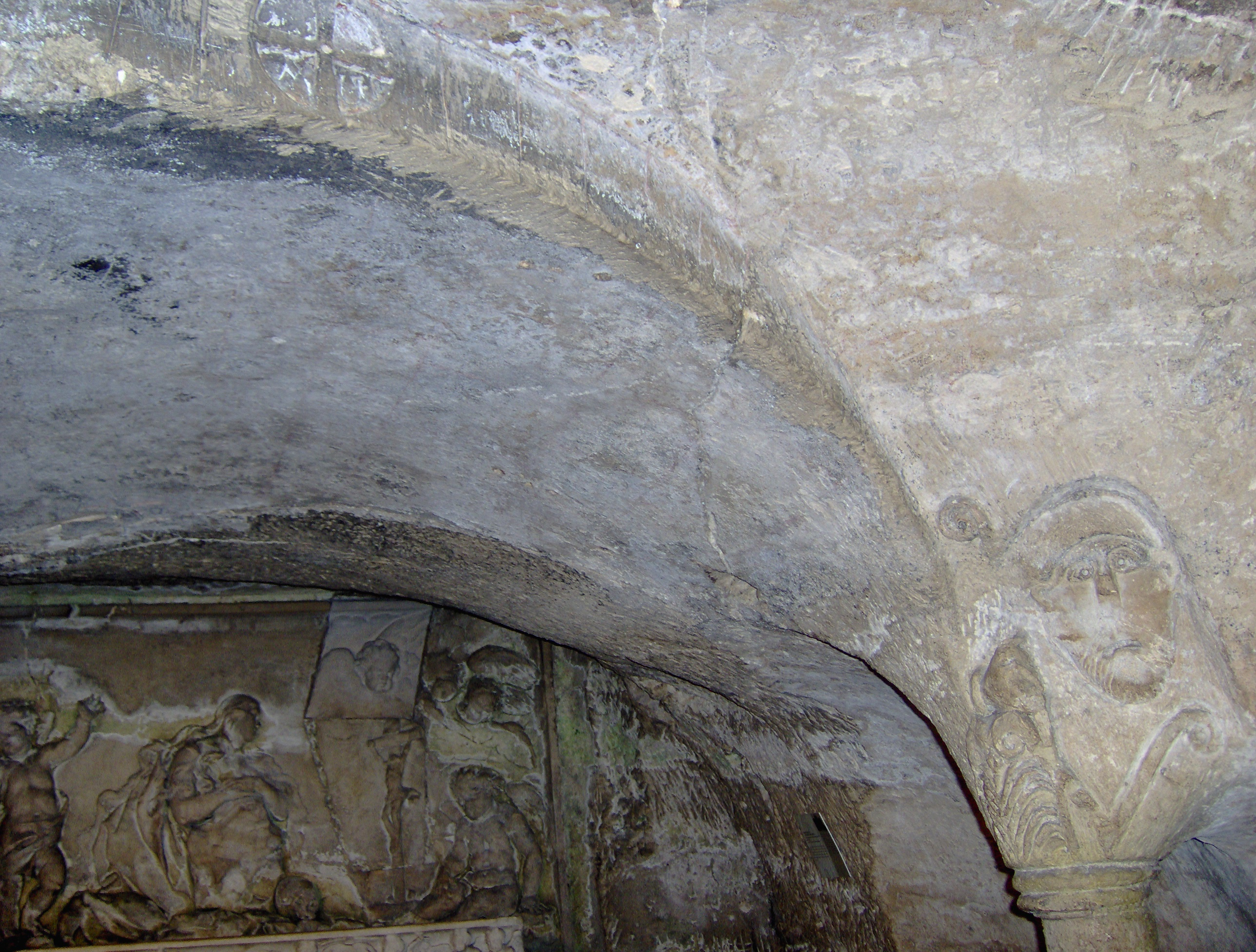 Crypte de l'abbatiale Saint-Victor de Marseille (13).